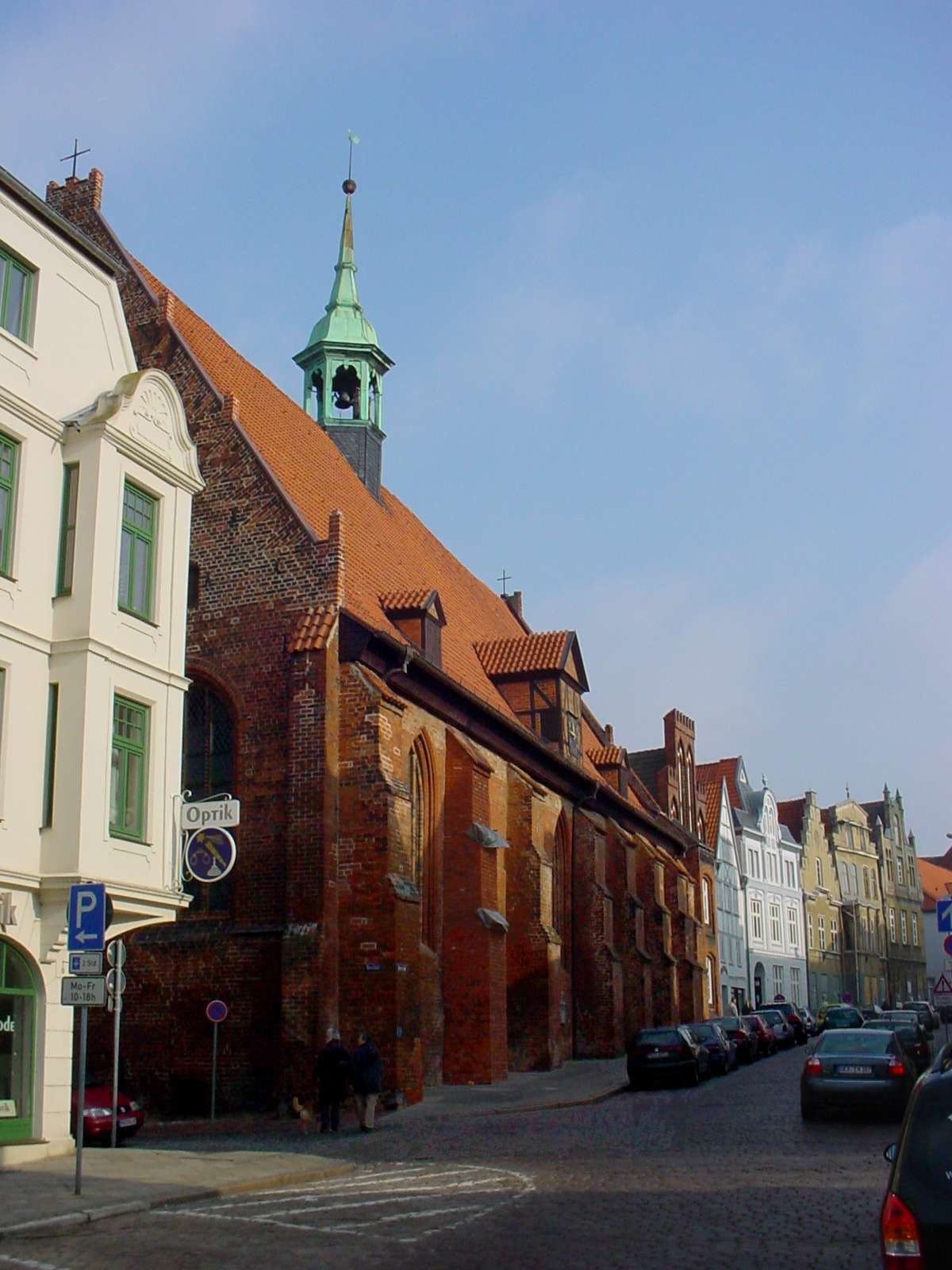 Heilig-Geist-Kirche in Wismar